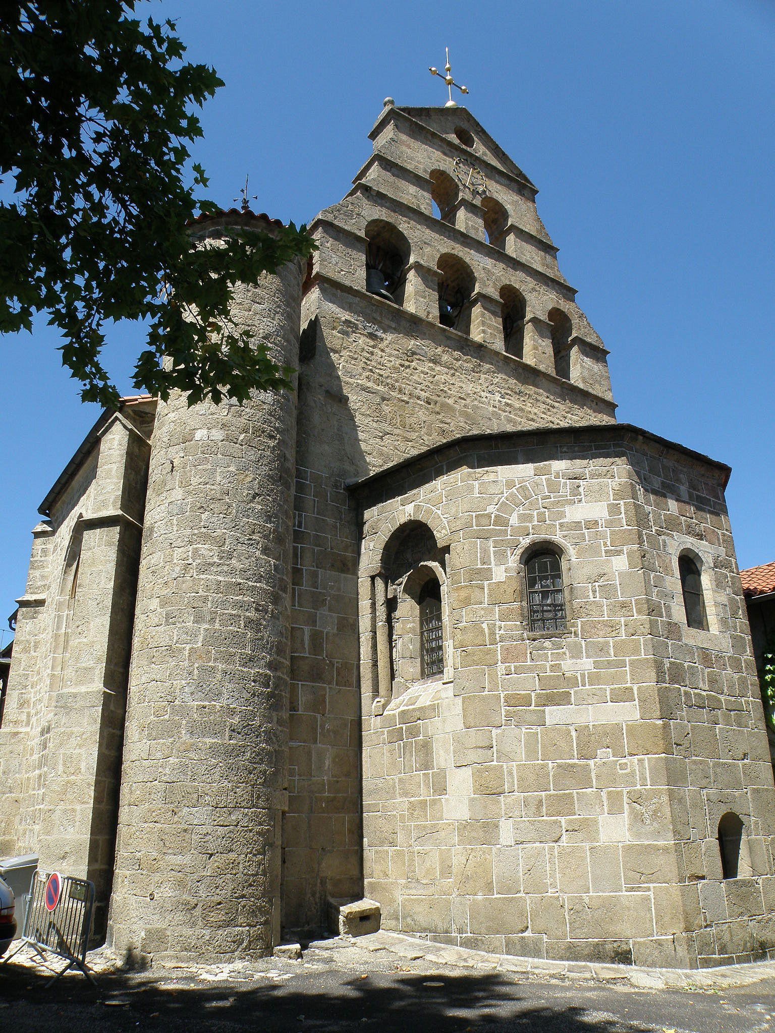 Beauzac, dép. de la Haute-Loire, France (Auvergne). Église, chevet avec clocher-peigne et abside romane.